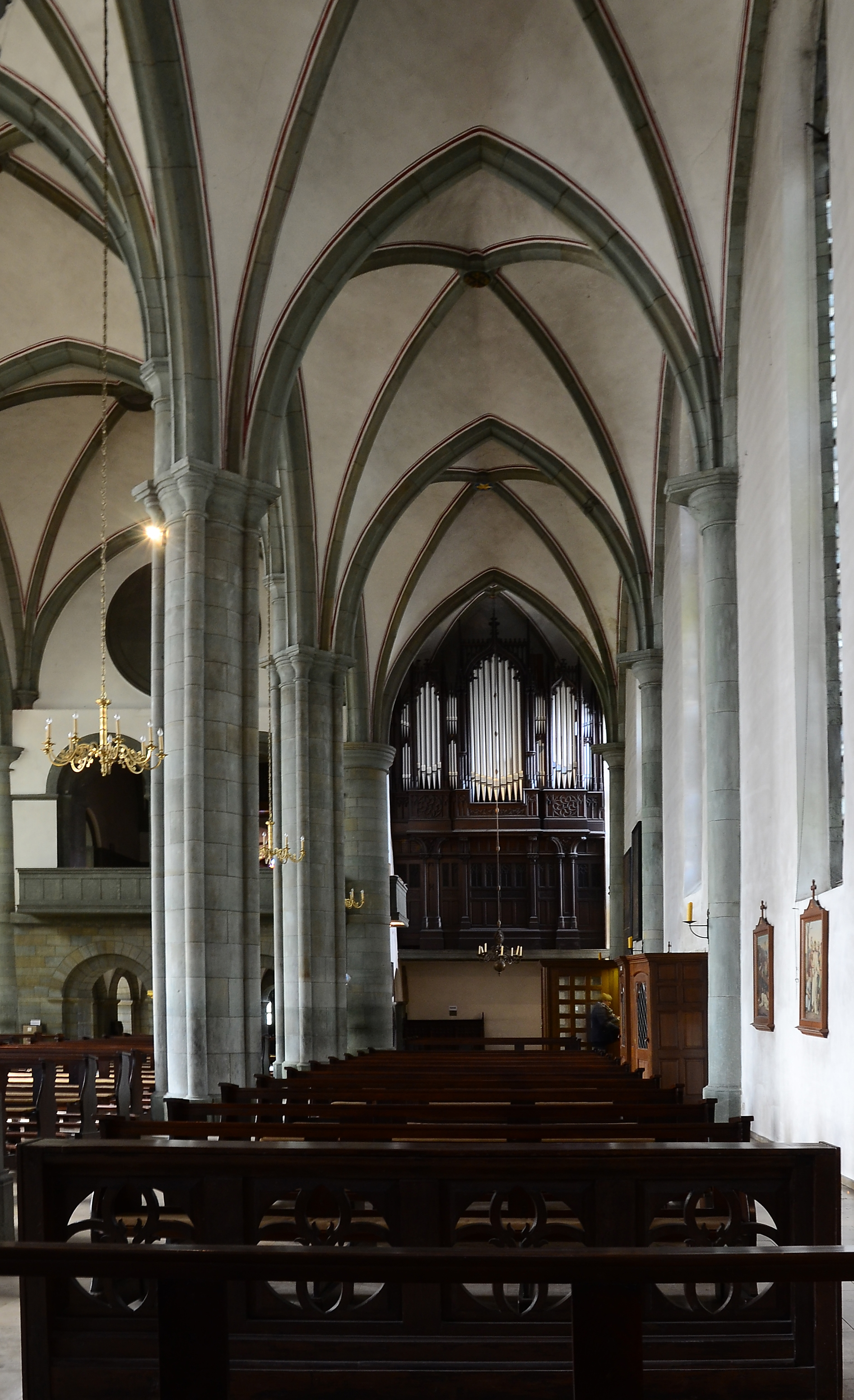 denkmalgeschützte Propsteikirche, Blick durch das Seitenschiff auf die Orgel